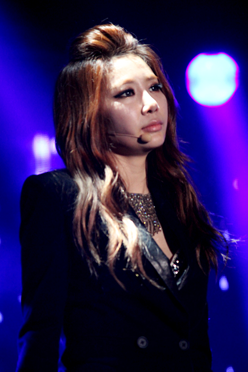 攝於2012/12/24首爾Tonight 37.2℃演唱會